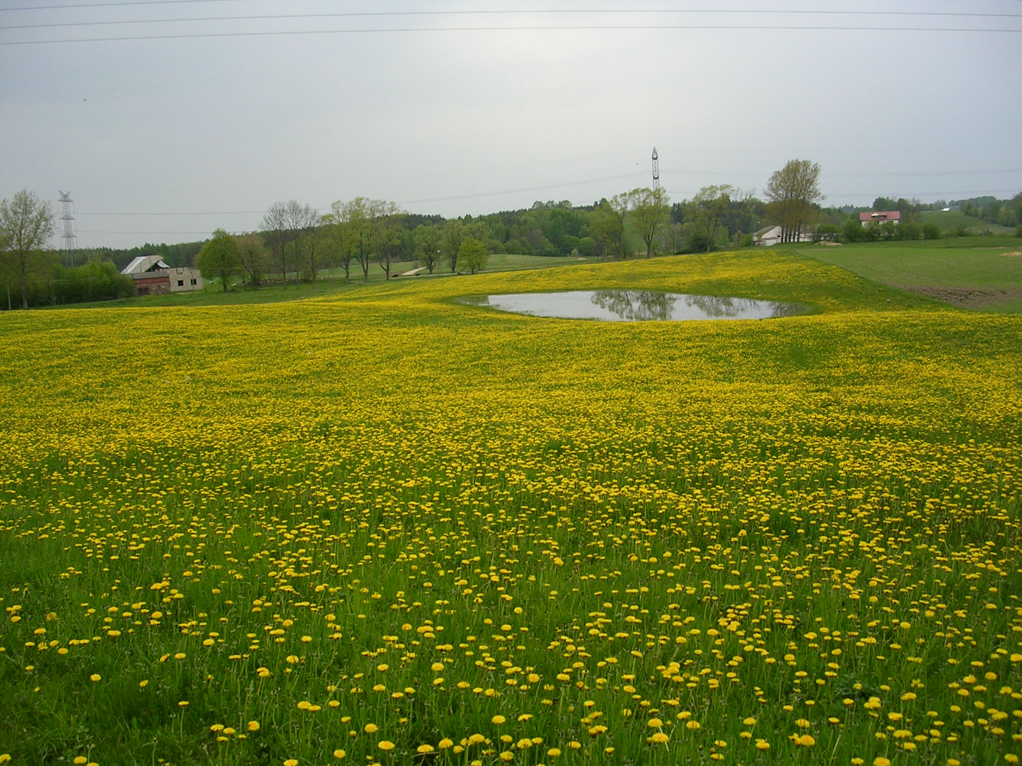 Dandelion meadow